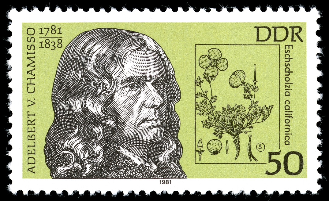 Ausgabepreis: 50 Pfennig Adelbert von Chamisso First Day of Issue / Erstausgabetag: 5. Mai 1981 Auflage: 3.500.000 Entwurf: Gerhard Stauf Druckverfahren: Offsetdruck Michel-Katalog-Nr: Ländercode-MiNr: 2607